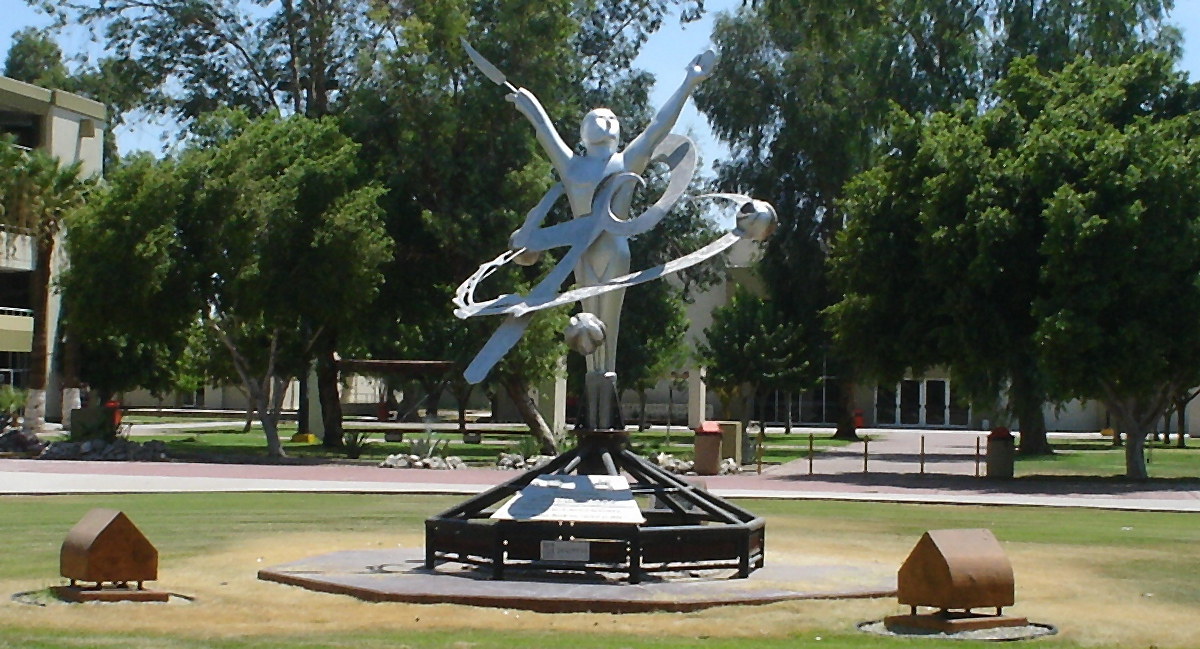 Estatua referente al 50 Aniversario de la UABC